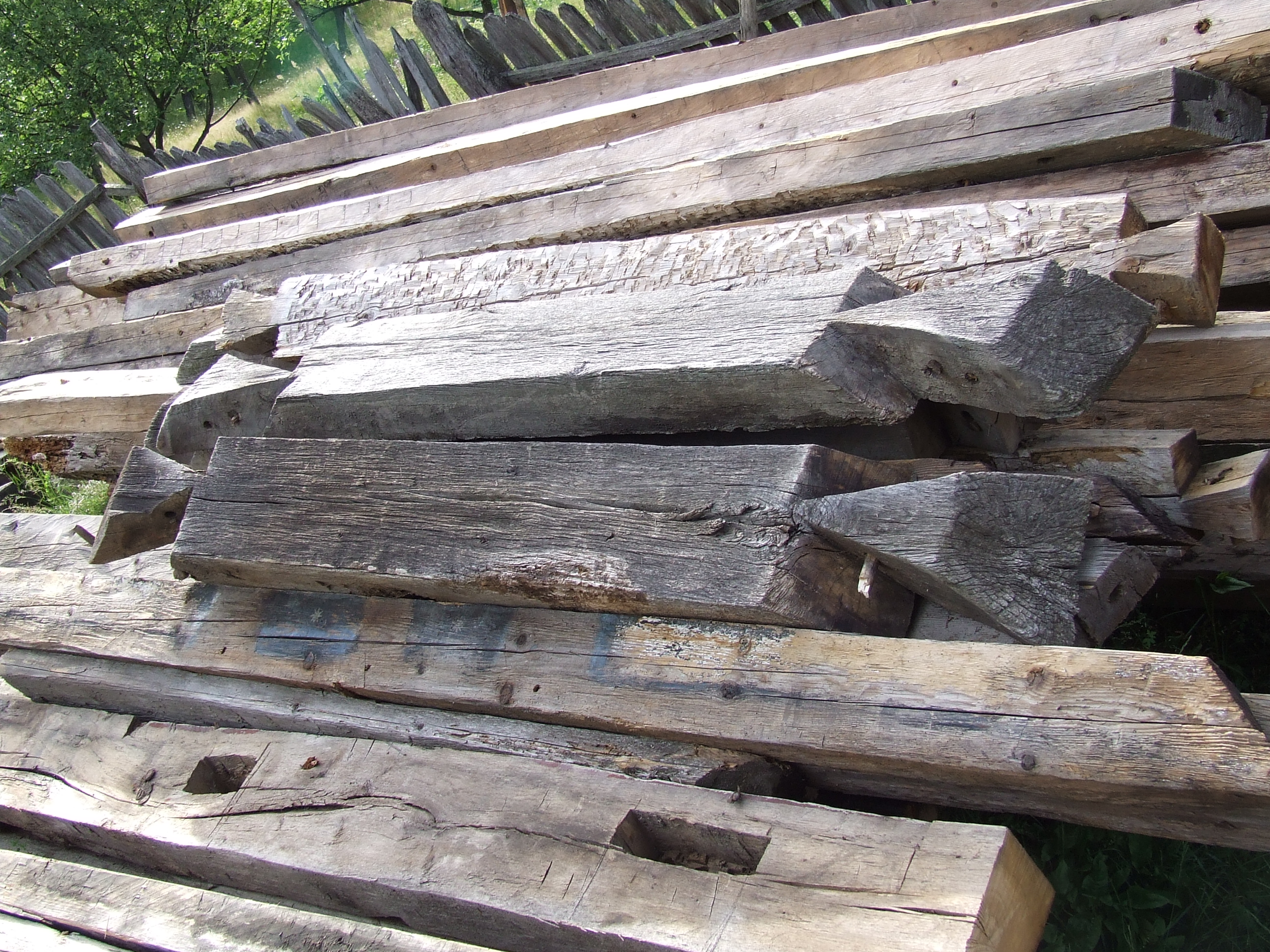 Biserica de lemn din Baia de Fier, cătunul Sohodol, județul Gorj.